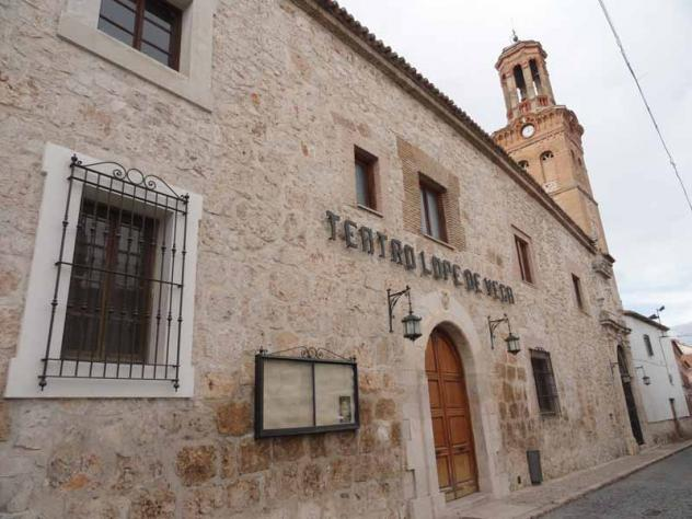 Fachada y Torre del Teatro Lope de Vega de Ocaña (Toledo).